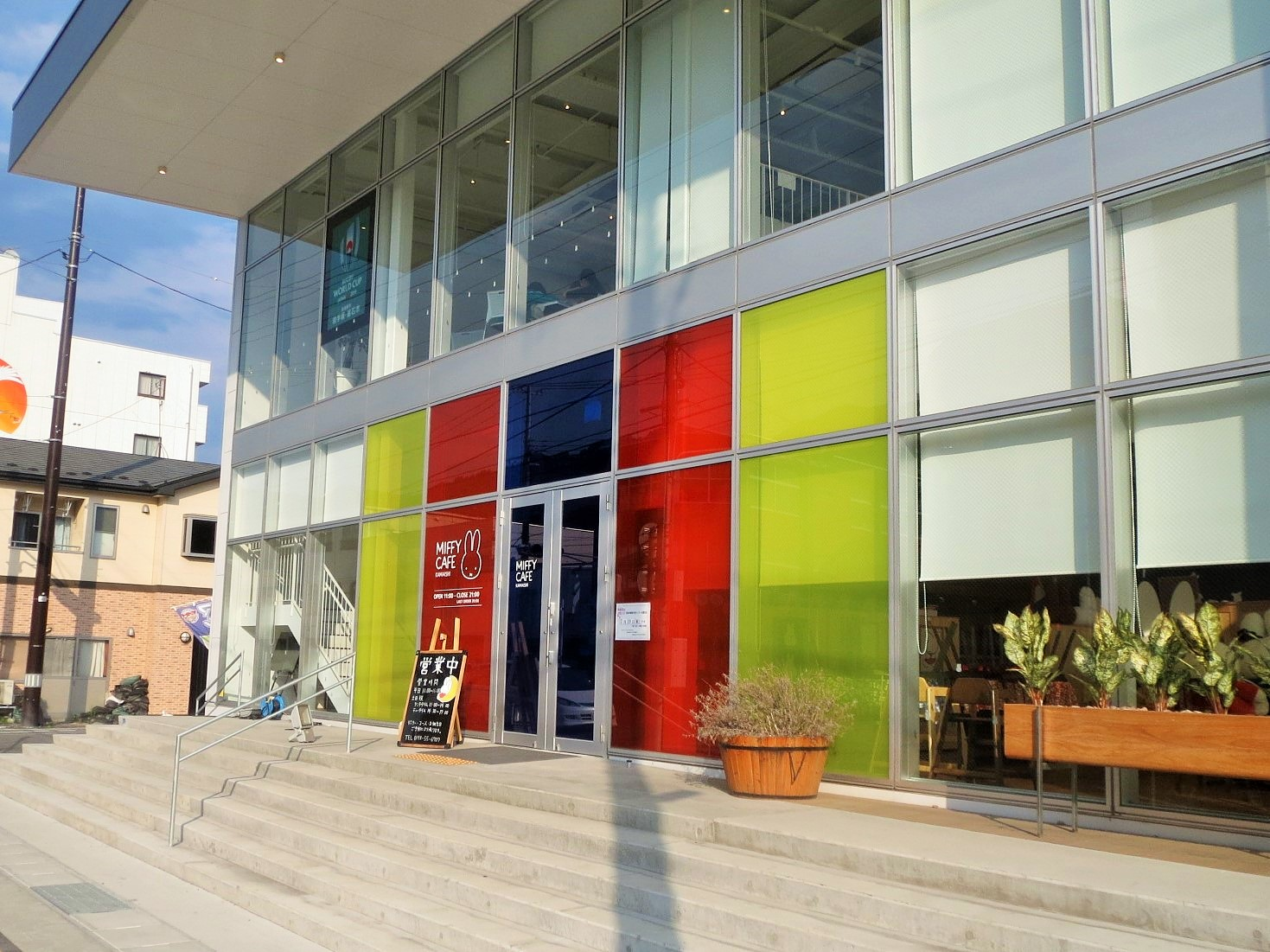 釜石市にあるミッフィーカフェかまいし Canon IXY 3